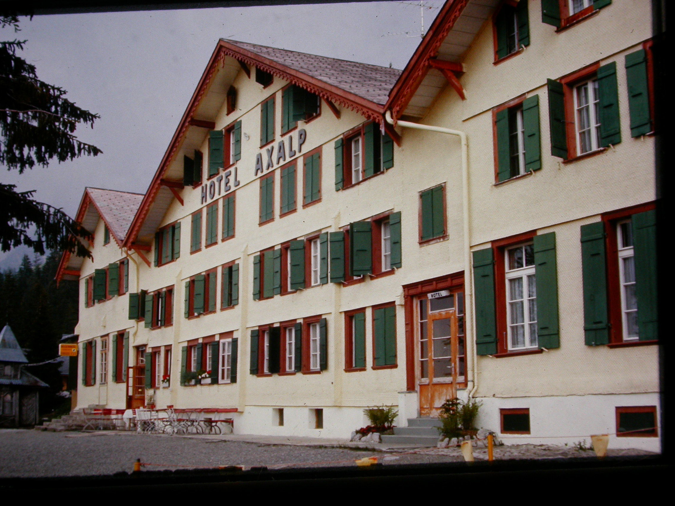 Hotel Axalp in Axalp, later Sporthotel Axalp from the 1920ies [1]